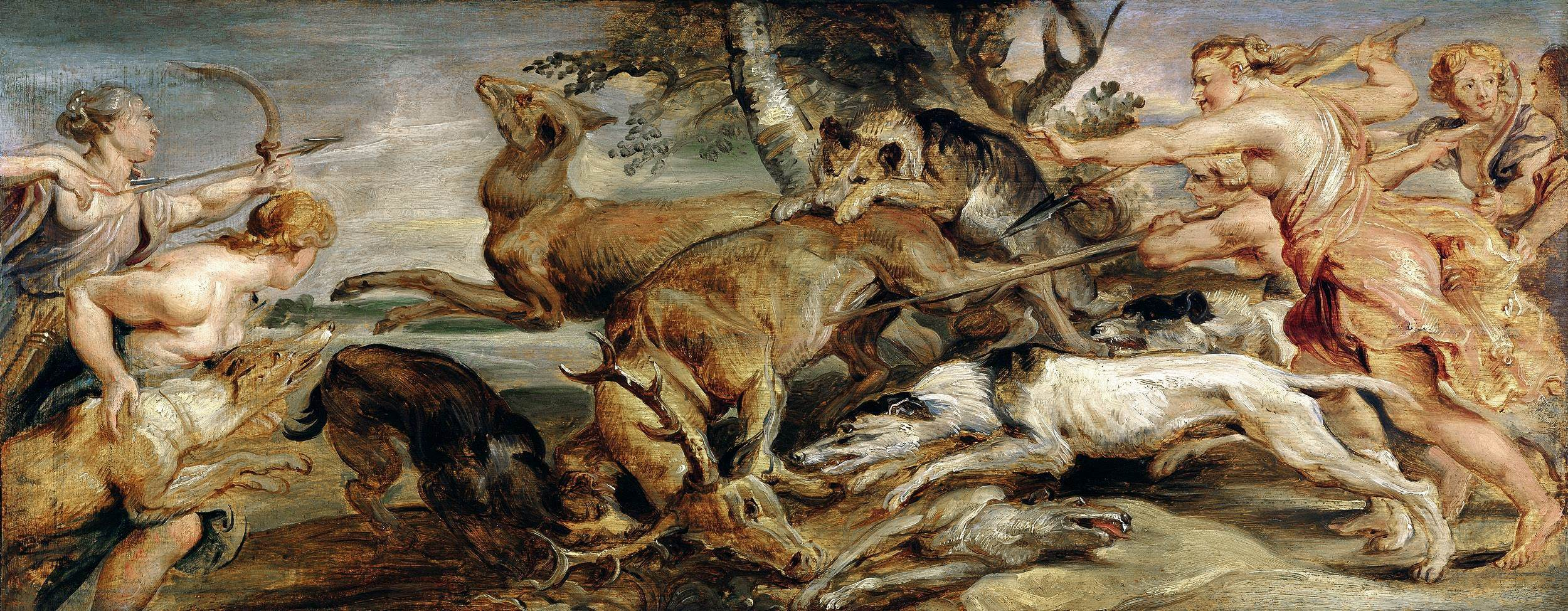 "Cacería de Diana", por Peter Paul Rubens. Boceto de Rubens de 1628 conservado en el Museo Liechtenstein de Viena. Muy posiblemente es el boceto para la obra del mismo título ("Cacería de Diana") que Rubens regaló al rey Felipe IV durante su visita a España en 1628 y que ardió en el incendio del Álcazar de Madrid en 1734.